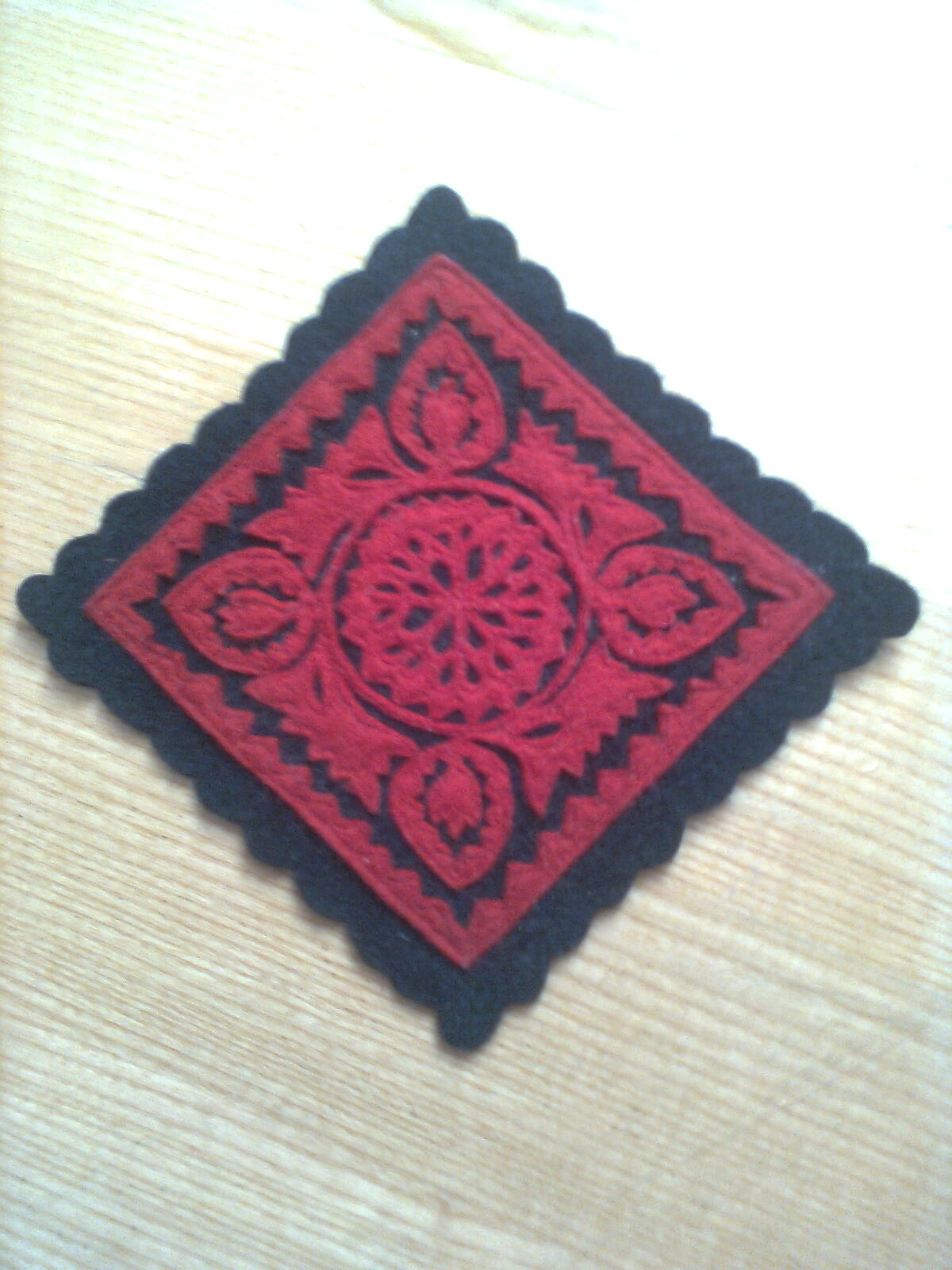 Fekete filcalapon piros filcrátét géppel varrva. A rátét minta eredetileg szűrminta. Poháralátét